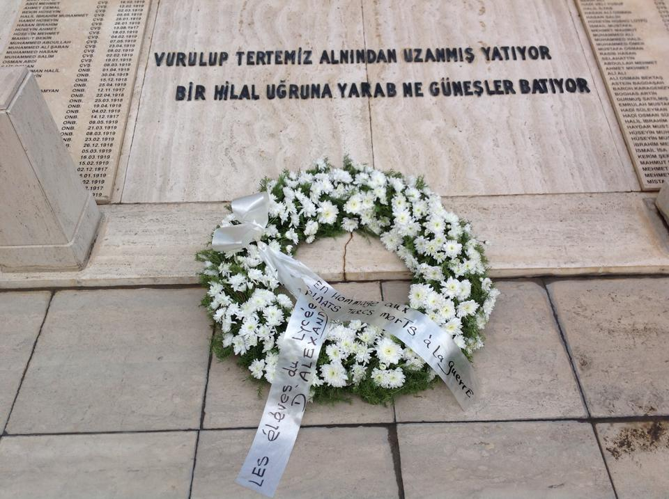 C'est l'épitaphe turc